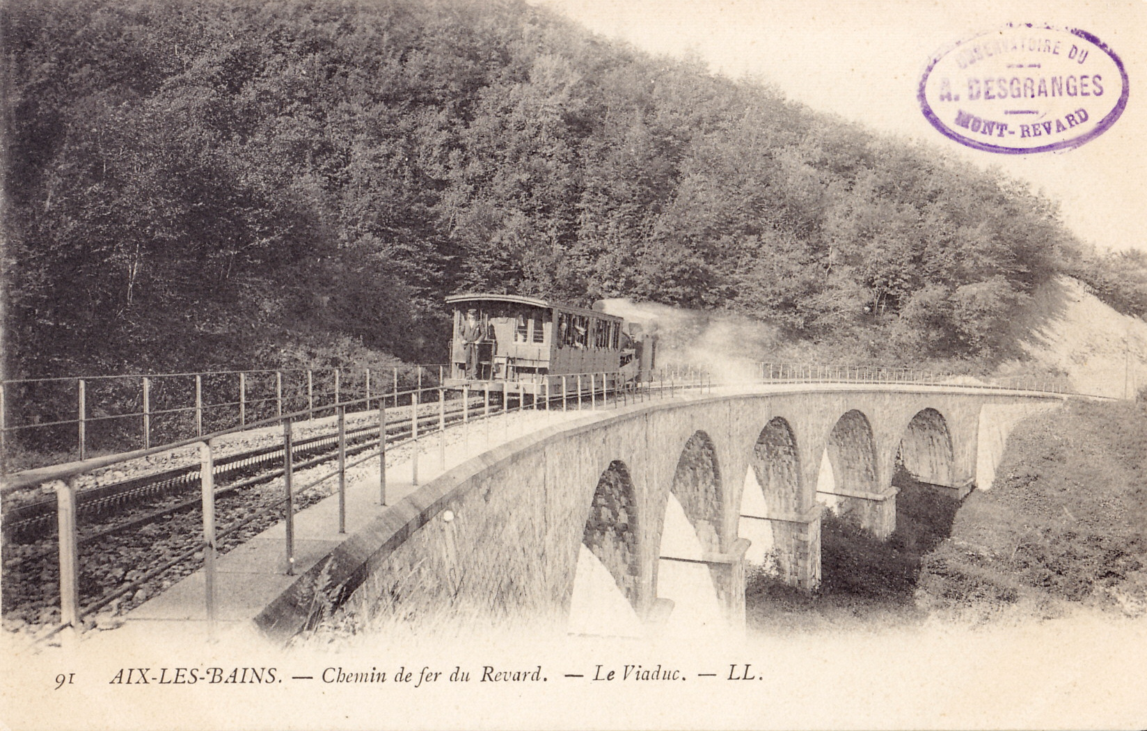 Carte postale ancienne éditée par LL n°91 : AIX-LES-BAINS - Chemin de fer du Revard - Le Viaduc.